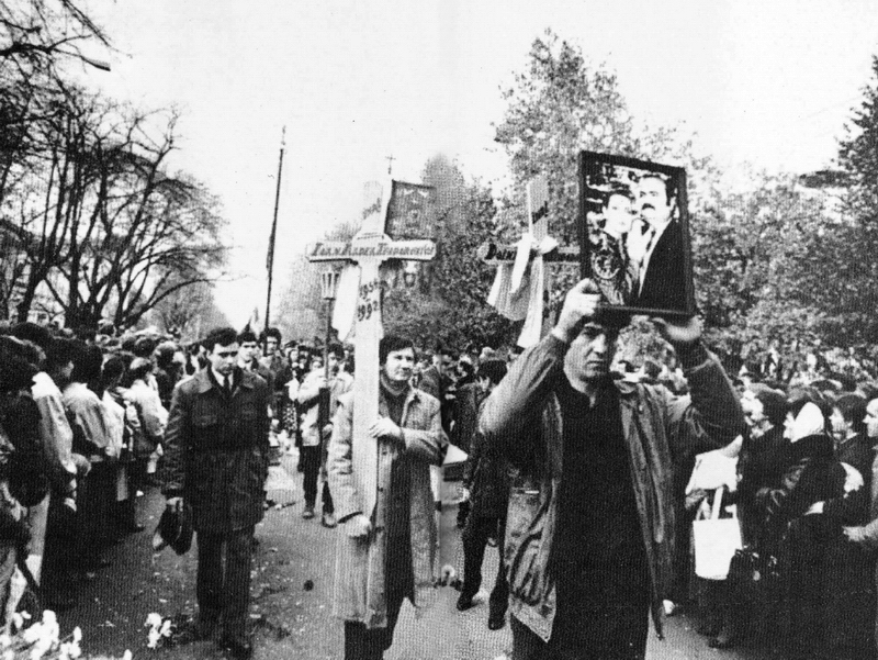 Imagini de la funerariile cuplului Ion si Doina Aldea Teodorovici